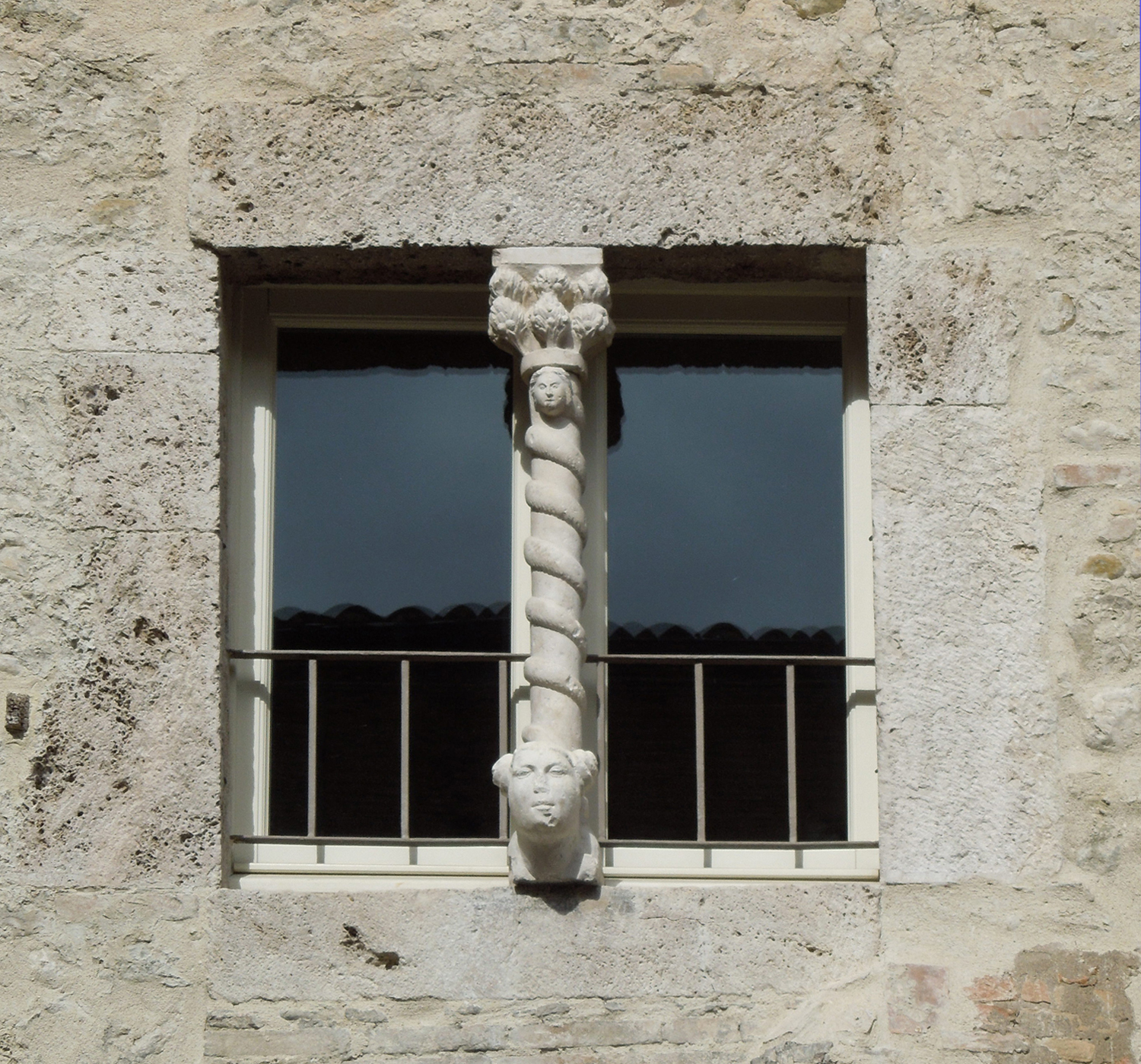 Finestra della Casa del Melatino, nella fascia mediana della facciata, resa bifora dalla colonnina tortile divisoria poggiante sulla base scolpita.